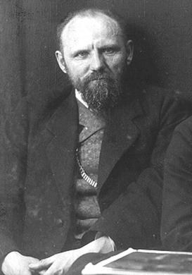 Антс Лайкмаа